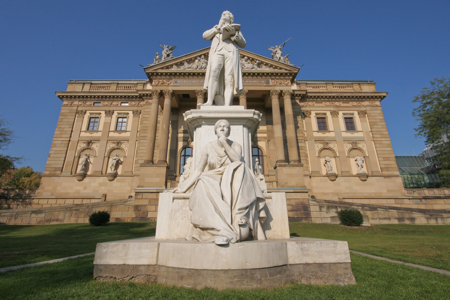 Parkseite des Hessisches Staatstheater Wiesbaden mit Schillerdenkmal